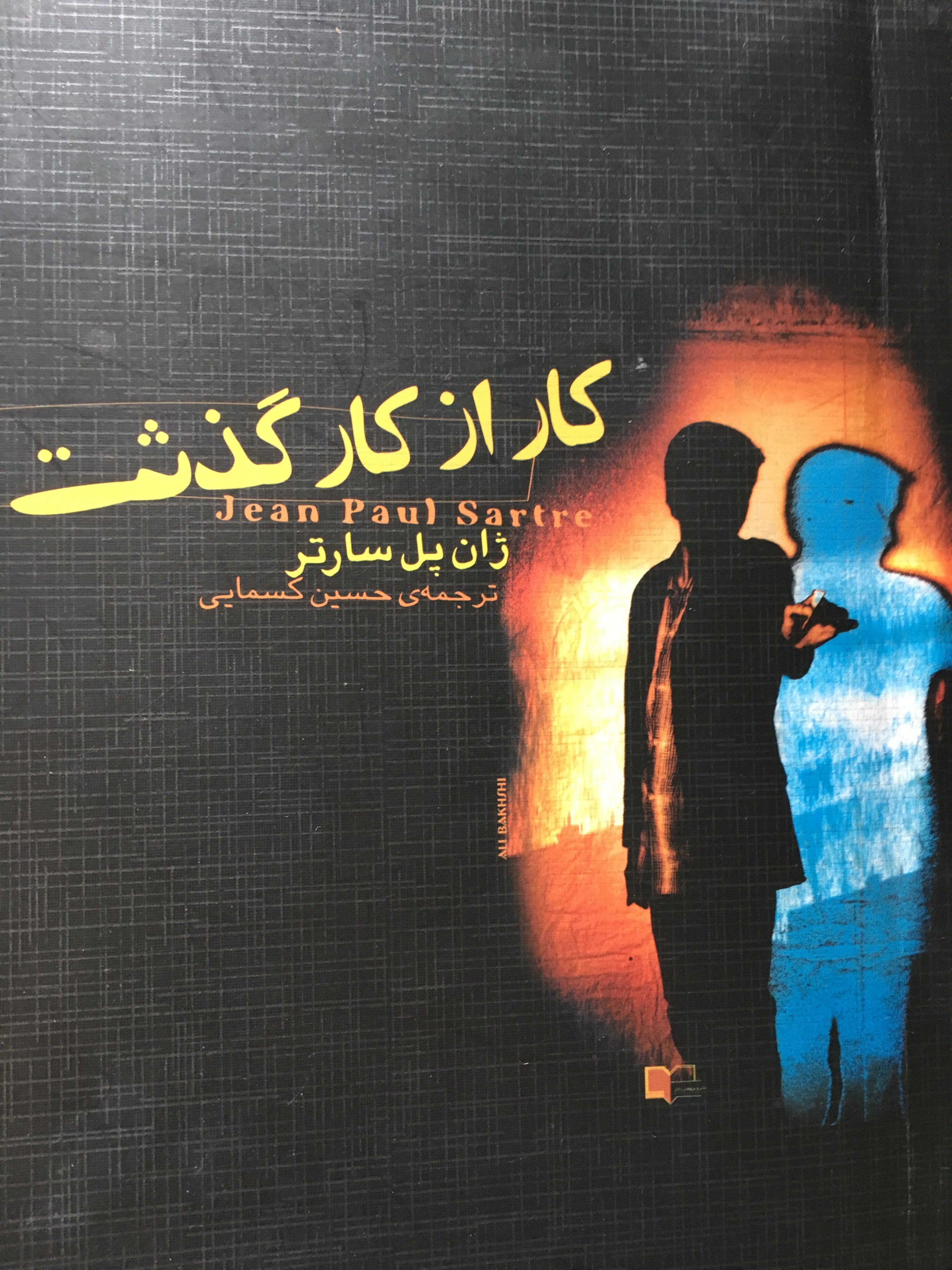 Traduction en persan